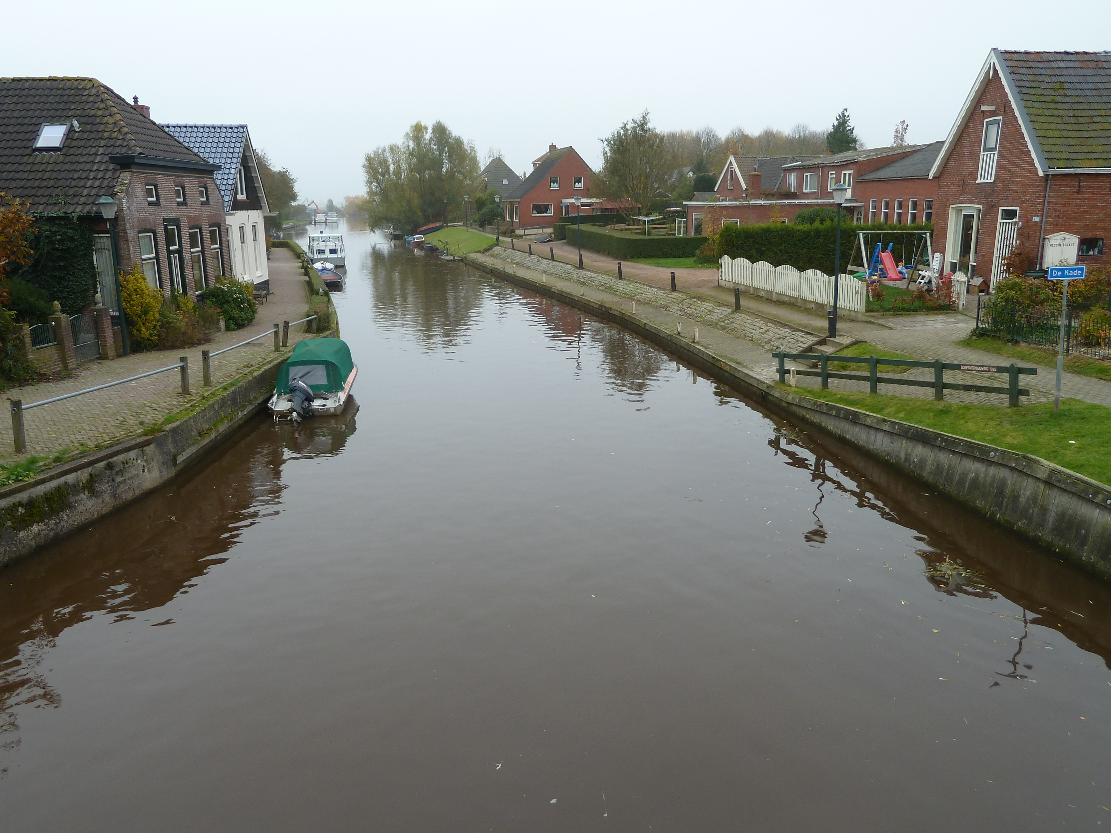 Kommerzijlsterdiep gezien vanaf de sluis in Kommerzijl.